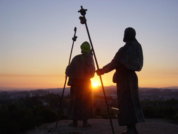 Peregrinos del Camino de Santiago al atardecer, en Monte do Gozo.